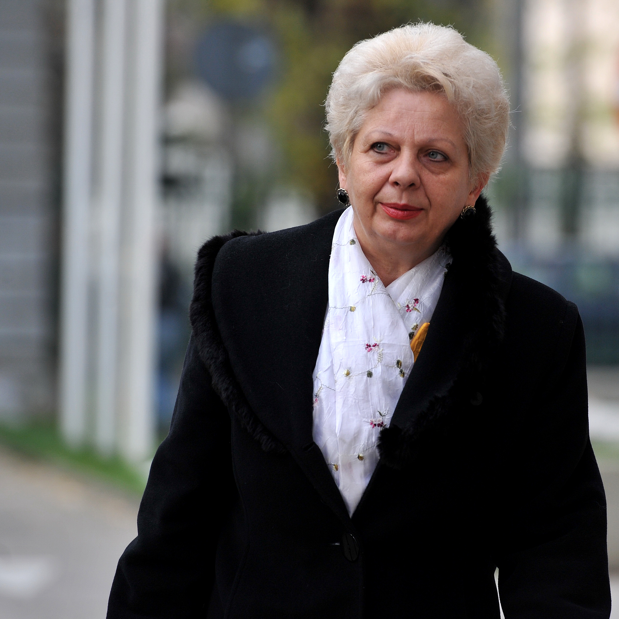 Doina Pana la reuniunea BPN - 02.12.2013